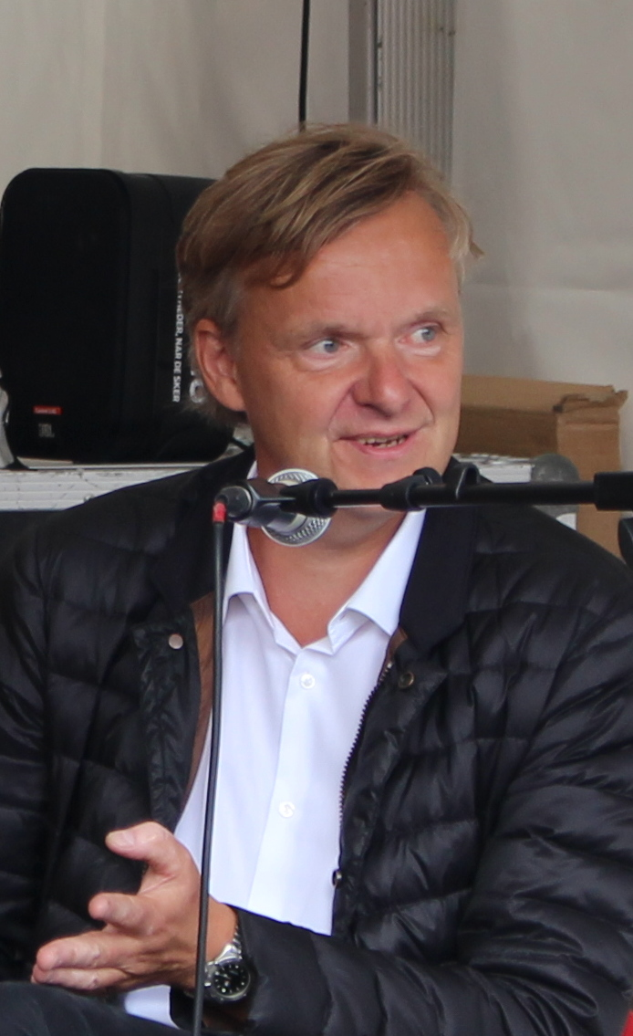 Poul Madsen, Folkemødet 2016 ved Ekstra Bladets stand under debat med Vincent Hendrick og Paula Larrain.